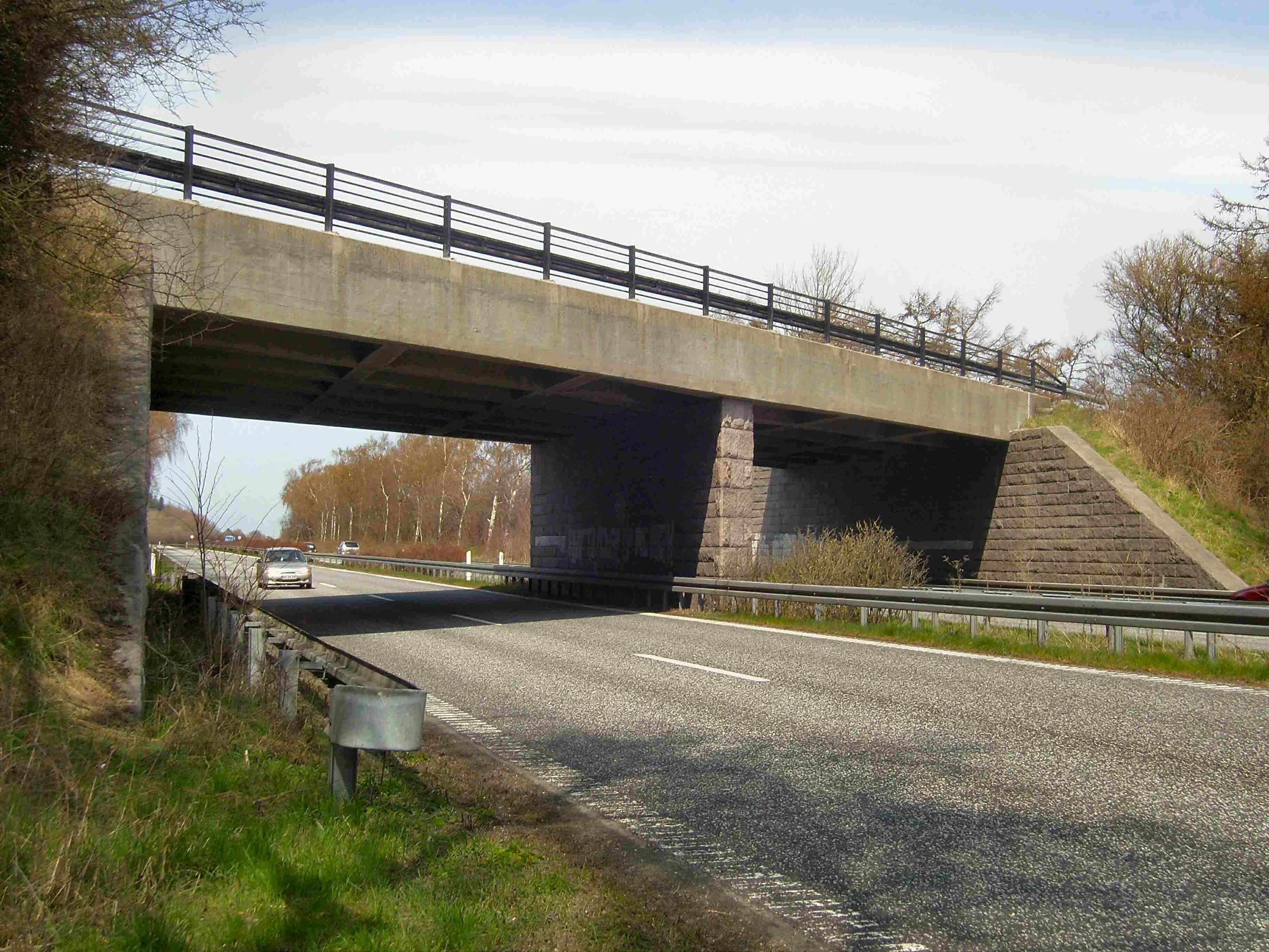 Motorvejsbro syd for Maribo, bygget i peroden 1941-1944